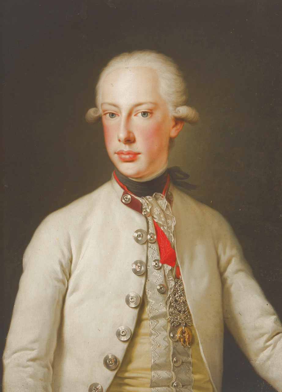 Ritratto di Carlo duca di Teschen (1771-1847)